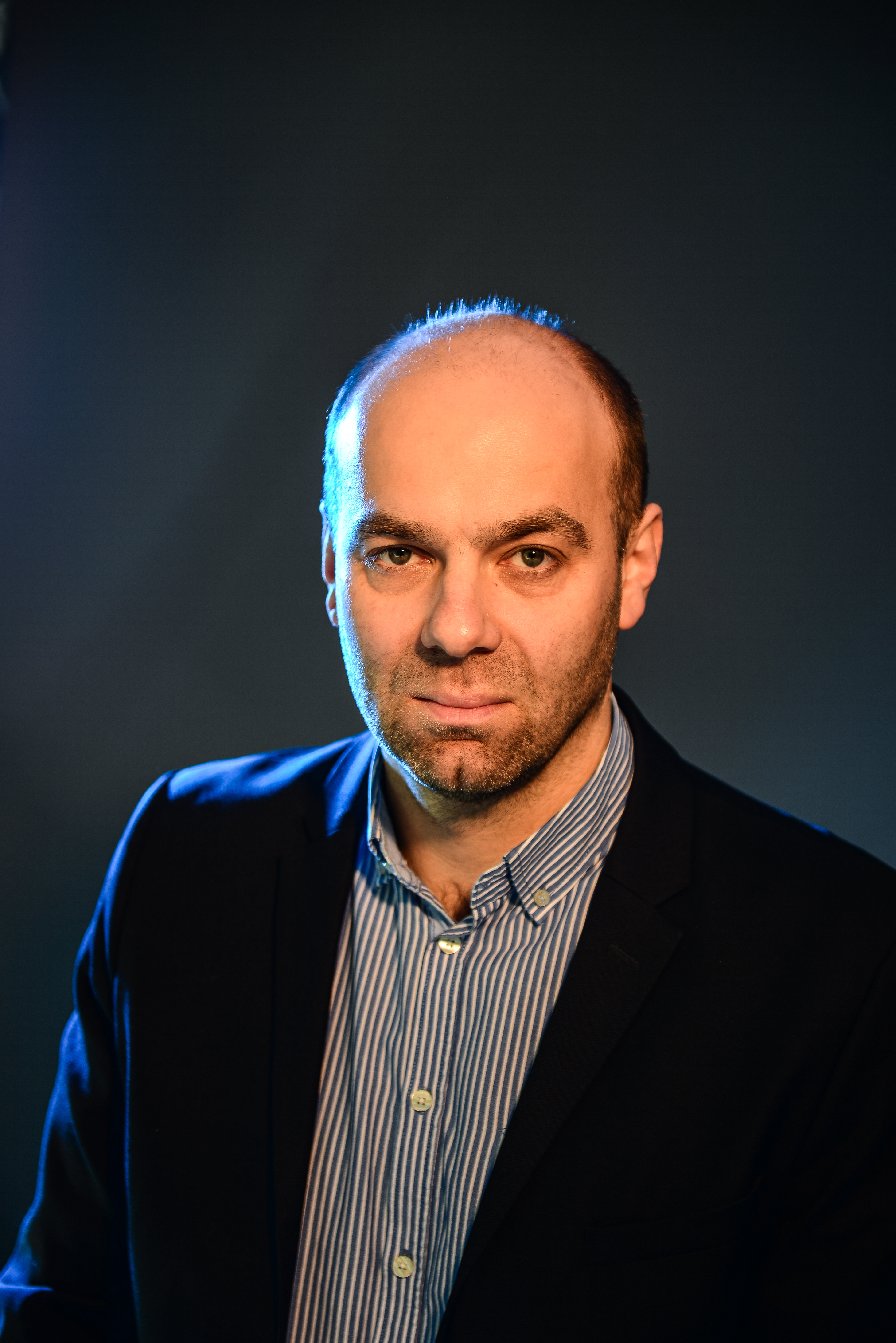 Tomasz Kudyk